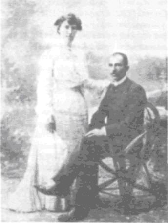 Стефан Константинов и съпругата му Невена Панова.